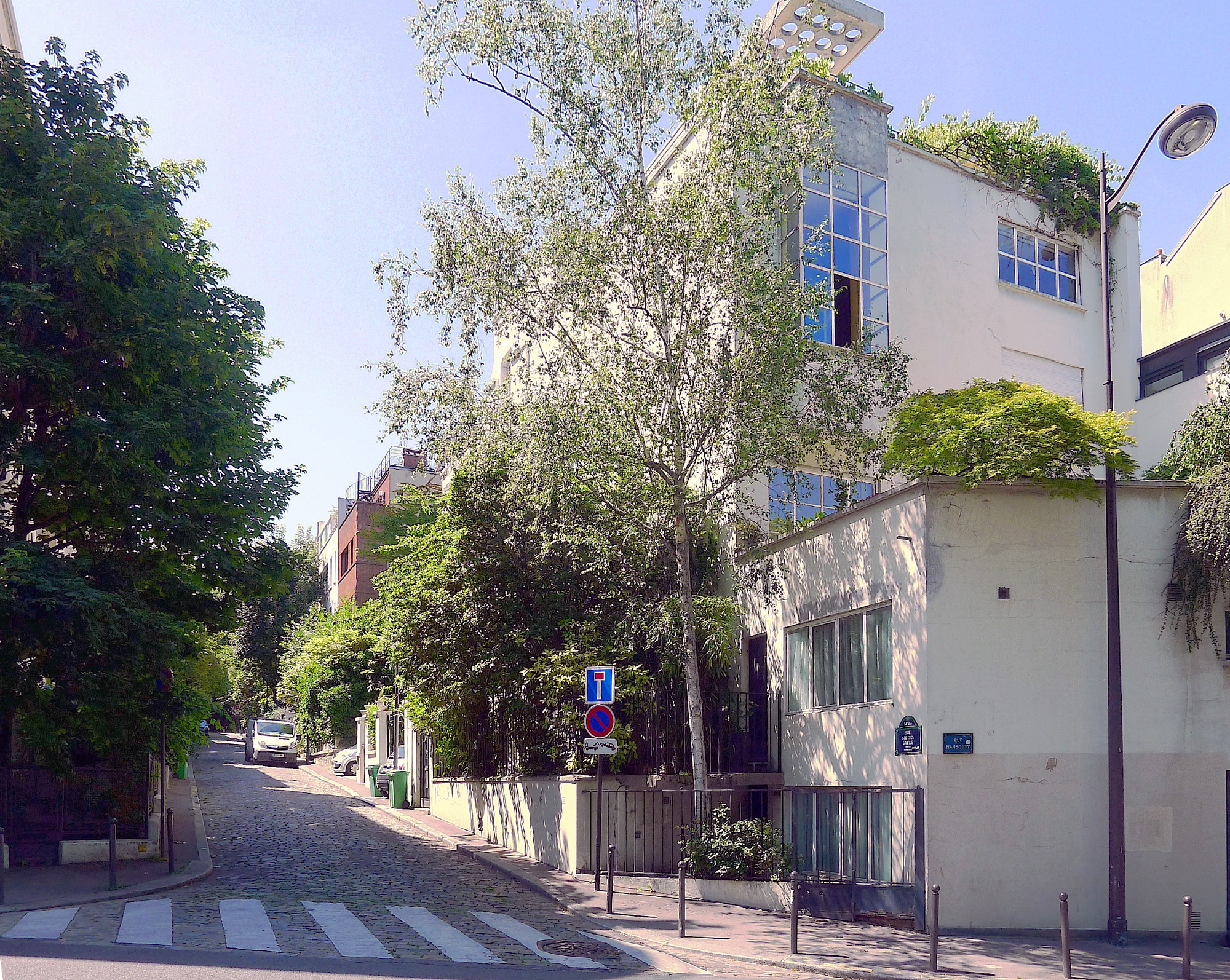 Résidence André Honnoratilla Guggenbuhl, 2 Rue Georges-Braque - Paris XIV